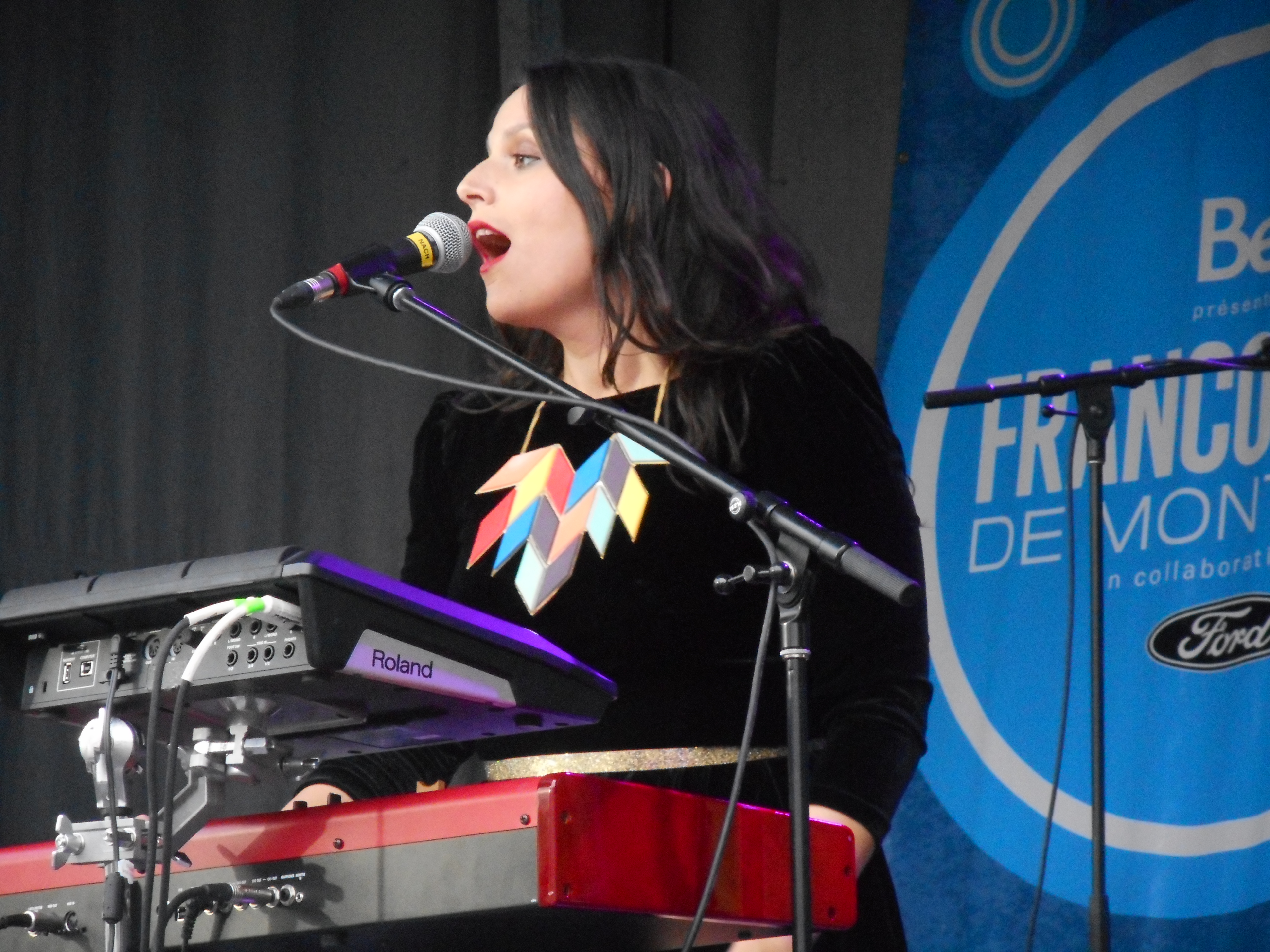 Nach (Anna Chedid), sur scène, à l'angle des rues Clark et Sainte-Catherine, le 10 juin 2016, dans le cadre des FrancoFolies de Montréal